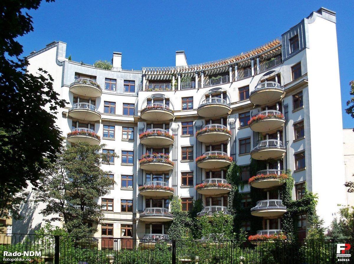 Rezydencja Opera przy Niecałej 7 widziana od strony Ogrodu Saskiego